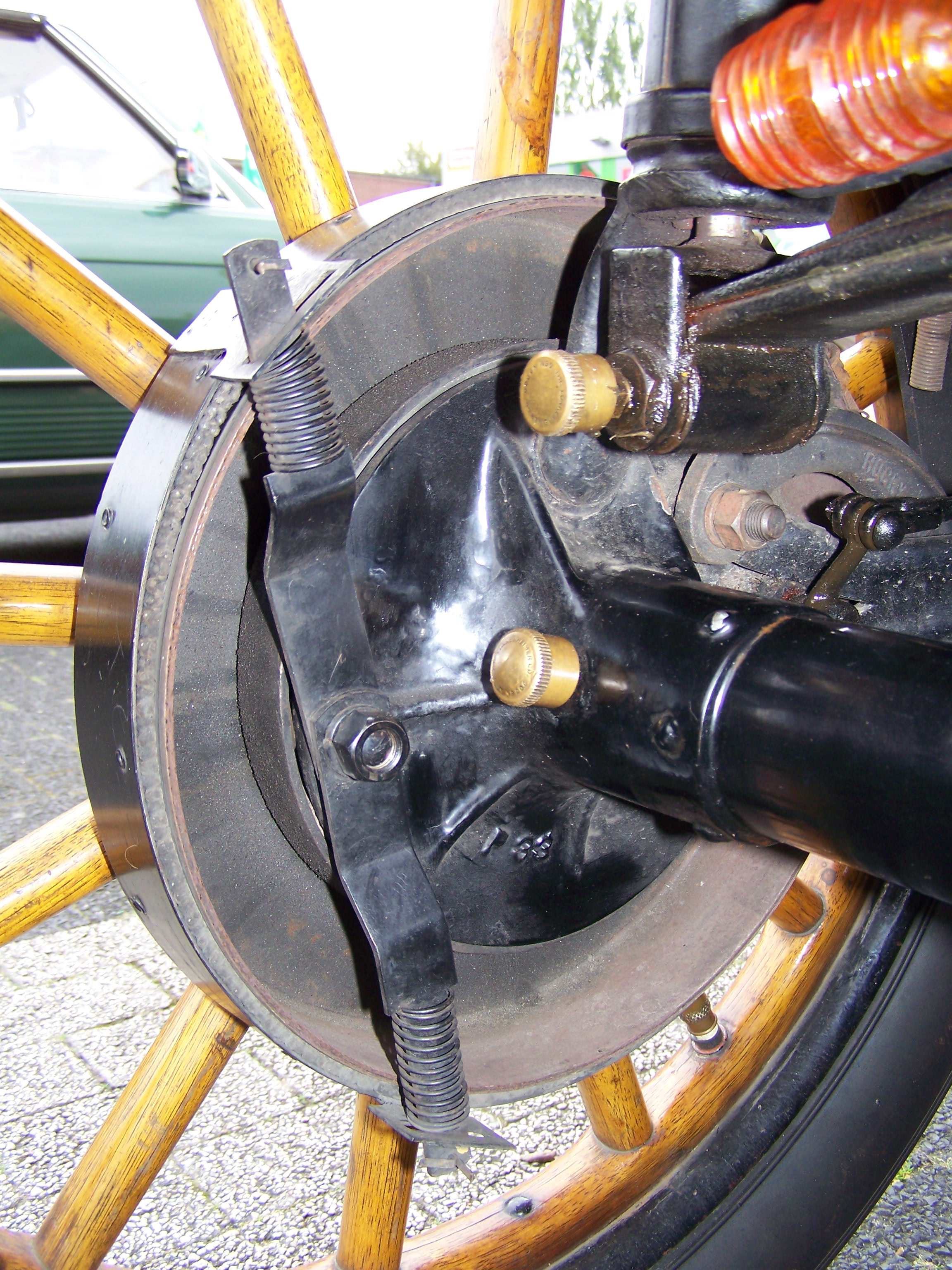 Detail Ford Modell T - 1914, in Herzogenrath